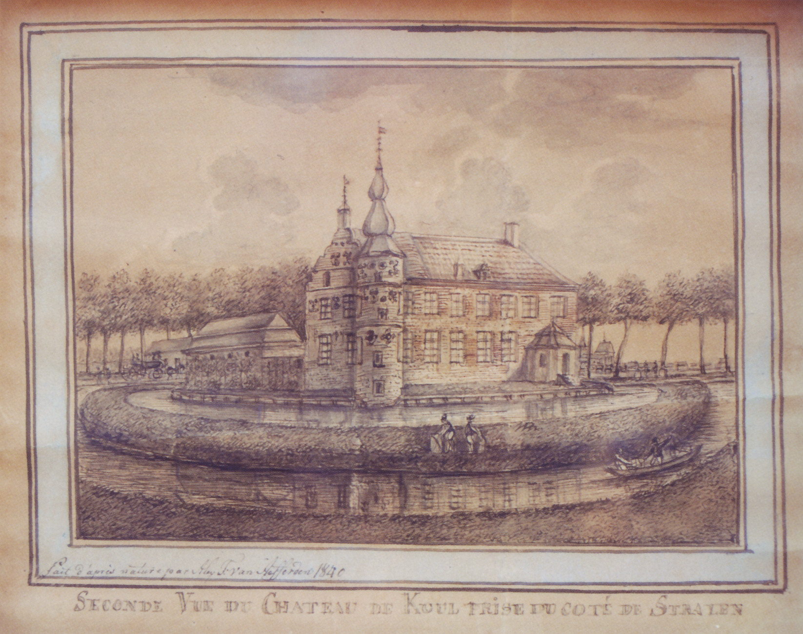 Ostseite des Hauses Coull in Straelen